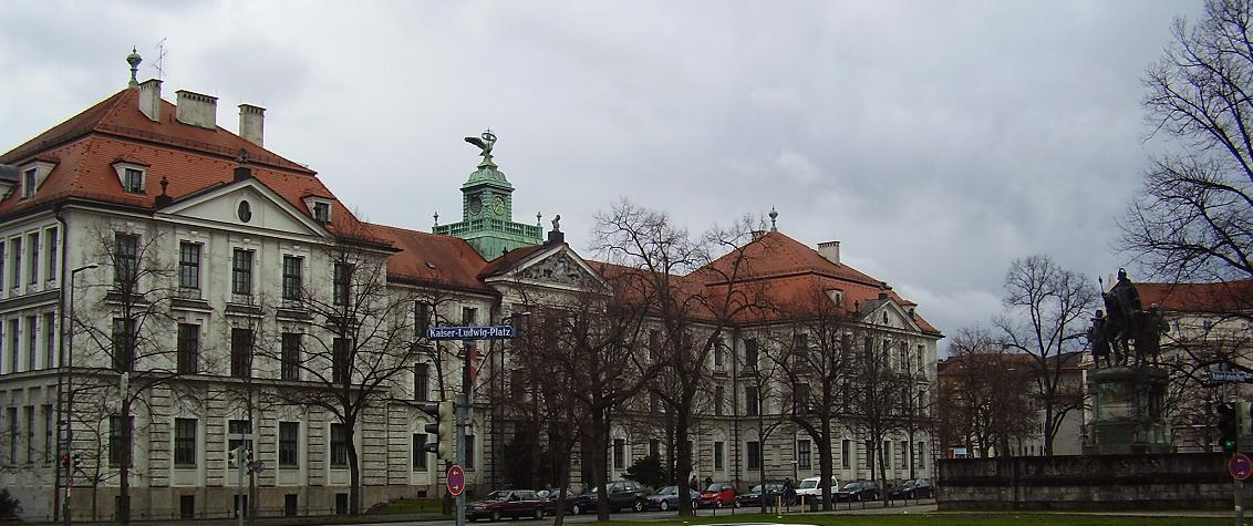 Theresien-Gymnasium in München (Munich / Germany)